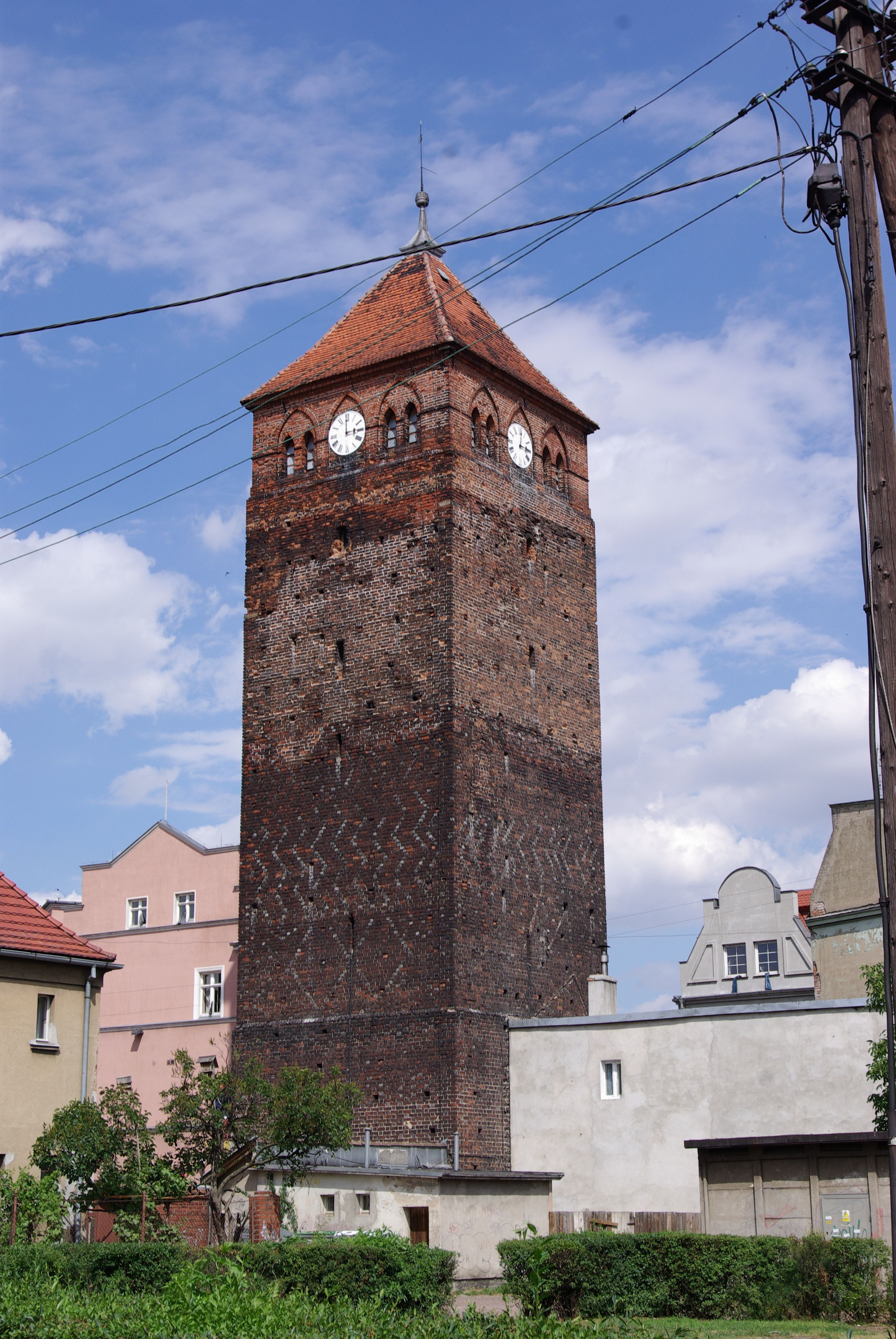 Góra, Polen, der Dohlenturm im Westen der Stadt